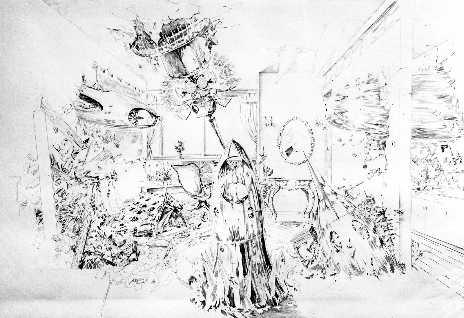 Milan Ressel, Průniky, černobílá fotografie barevné kresby 150x210 cm (1969)